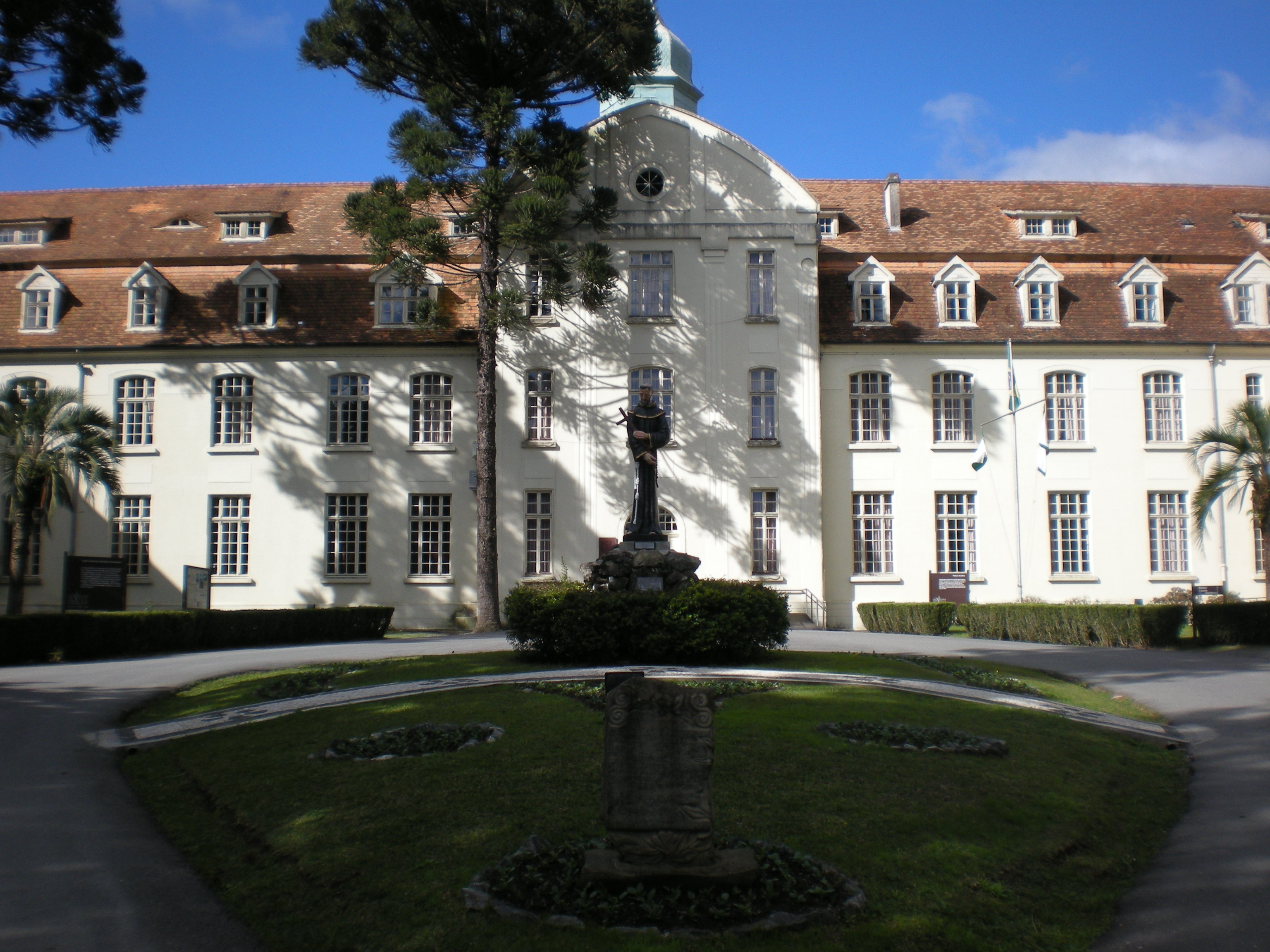 Seminàrio Seráfico na cidade de Rio Negro- PR